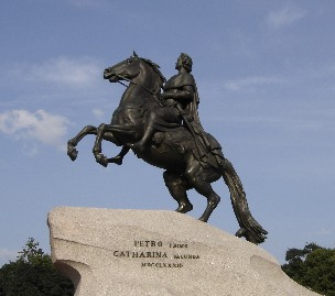 Statue équestre de Pierre le Grand par Falconet à Saint Pétersbourg, erigée sur ordre de Catherine II.